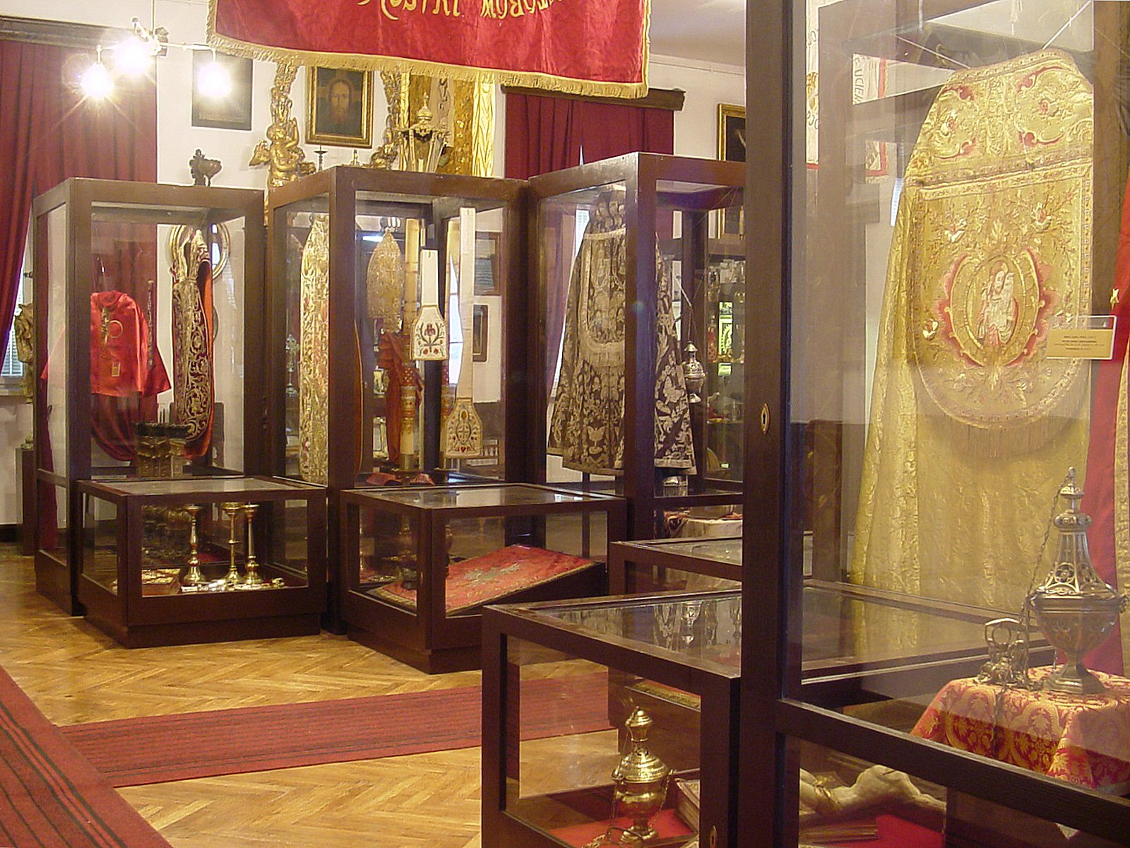 Wnetrze Muzeum Jezuitow w Starej Wsi fot. Andrzej Sułkowski